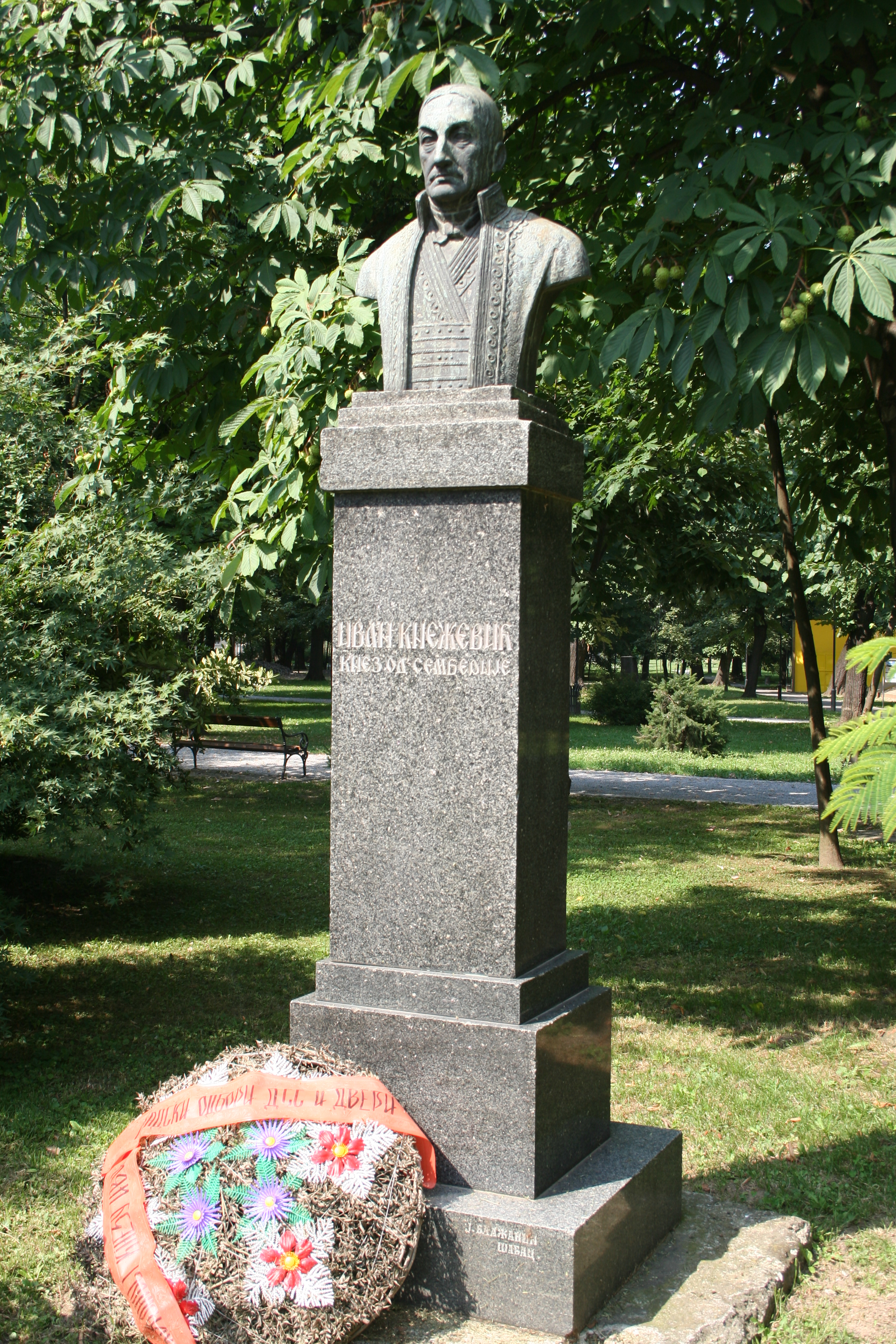 Gradski park Šabac